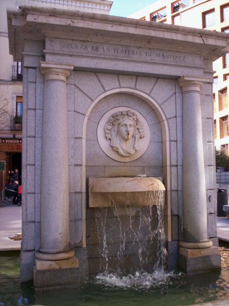 Fuente de la Plaza de Platería Martínez, junto al Paseo del Prado en el tramo denominado Cuatro Fuentes. El edificio del fondo es la fachada lateral (calle de Huertas) del Ministerio de Sanidad (durante el franquismo de los Sindicatos Verticales). Madrid. La Platería de Martínez fue una institución industrial y científica importante durante la ilustración española (siglo XVIII).